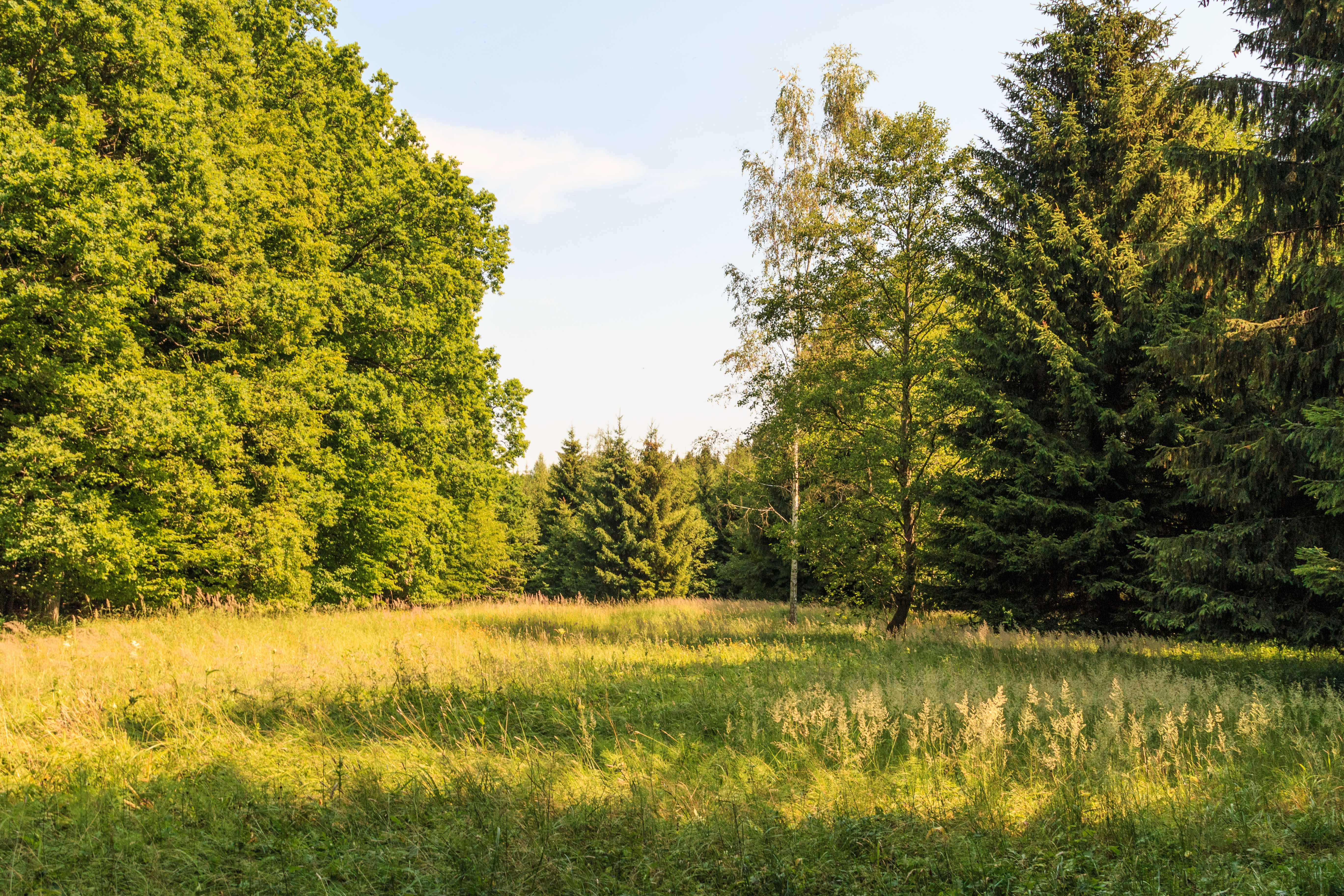 PP Farářova louka Project: Chráněná území.